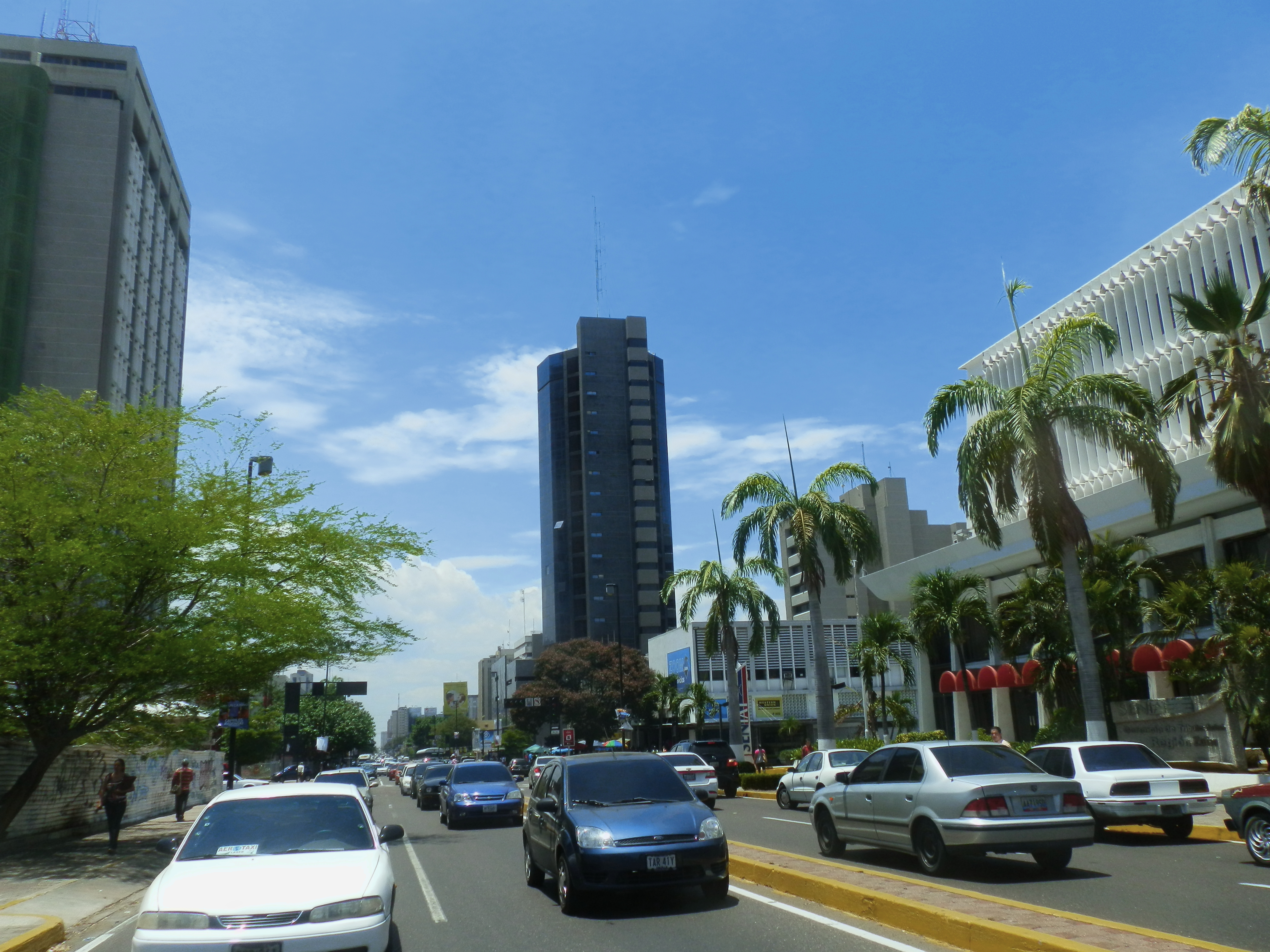 Edificios en la Avenida 5 de Julio, Maracaibo, Venezuela